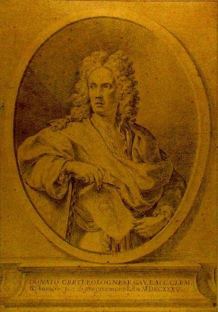 Self-portrait